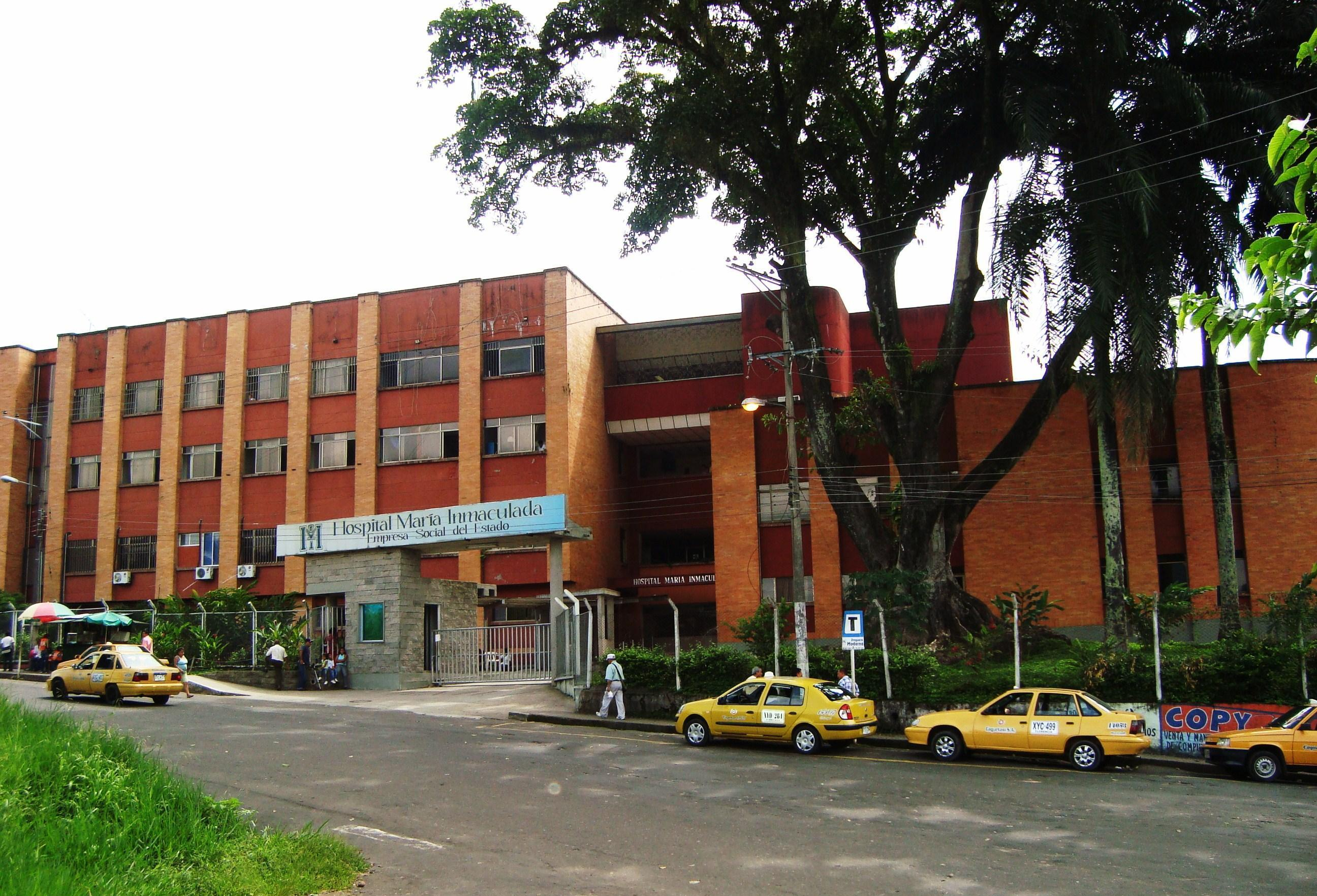 Hospital Departamental María Inmacualada en Florencia, Caquetá, Colombia